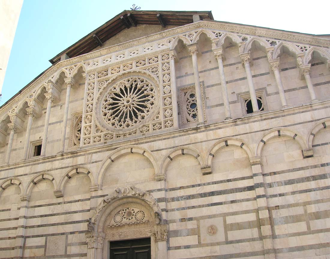 Facciata del Duomo di Carrara. Immagine di mia proprietà e rilasciata con licenza GFDL.